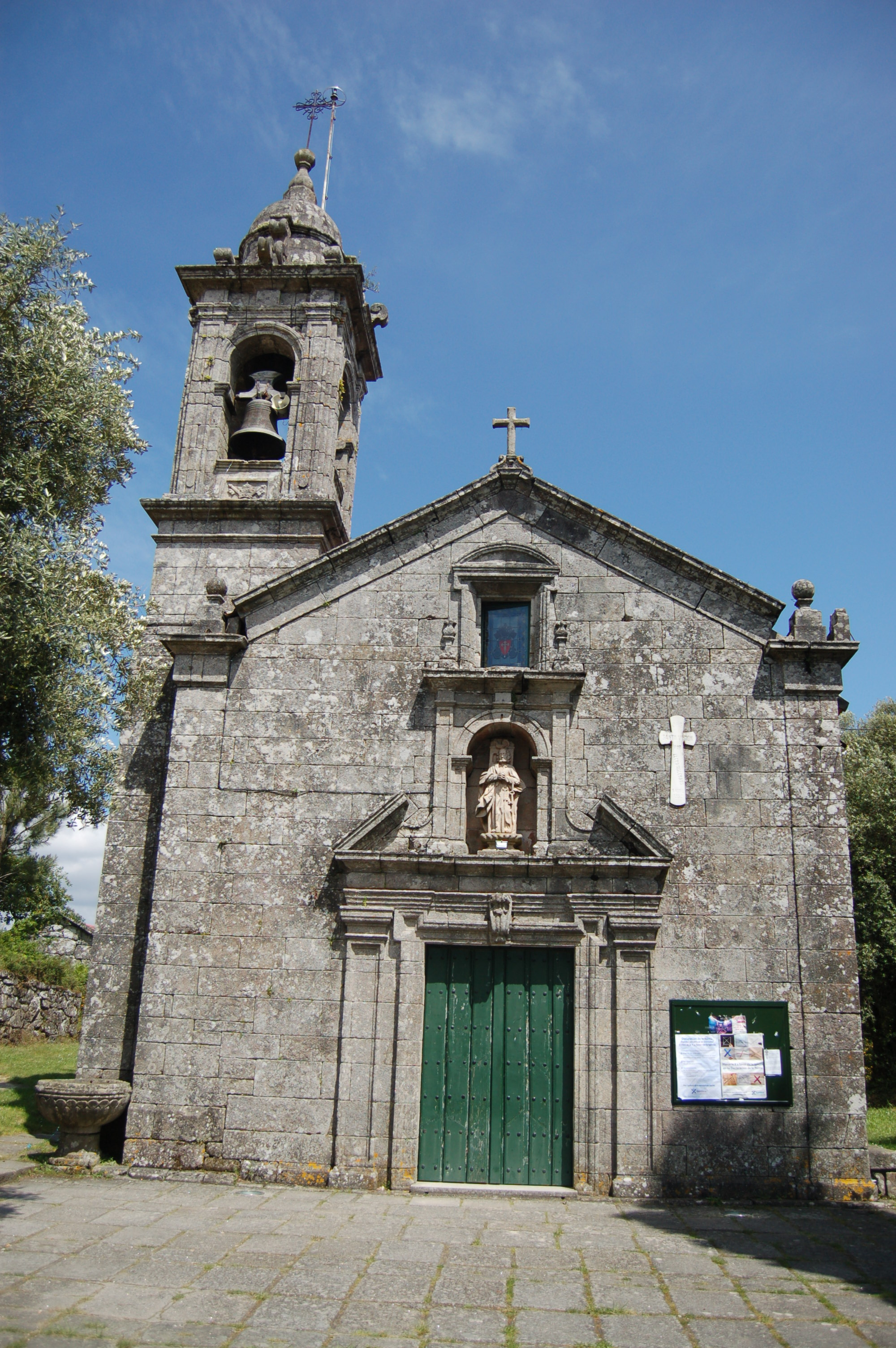 Igrexa parroquial de San Pedro de Campañó (Pontevedra)